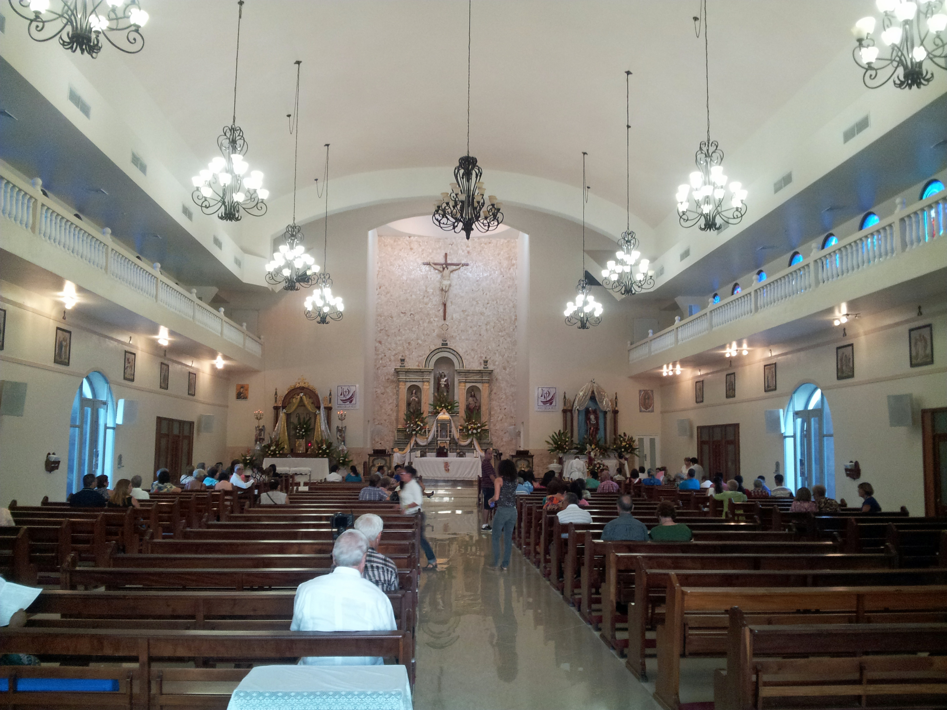 Interior de la Iglesia San Miguel Arcángel en el Centro.